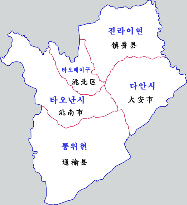 바이청시 현급구역도